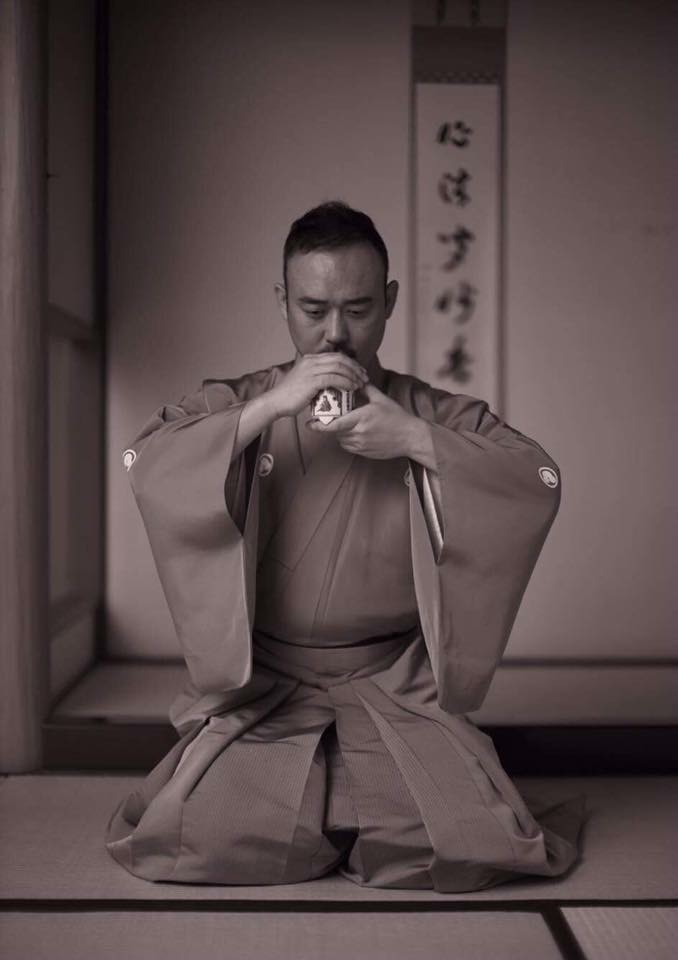 志野流香道家元後継 蜂谷一枝軒宗苾